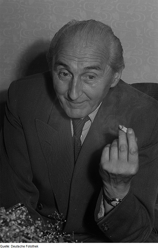 Original image description from the Deutsche Fotothek Edgar Bennert